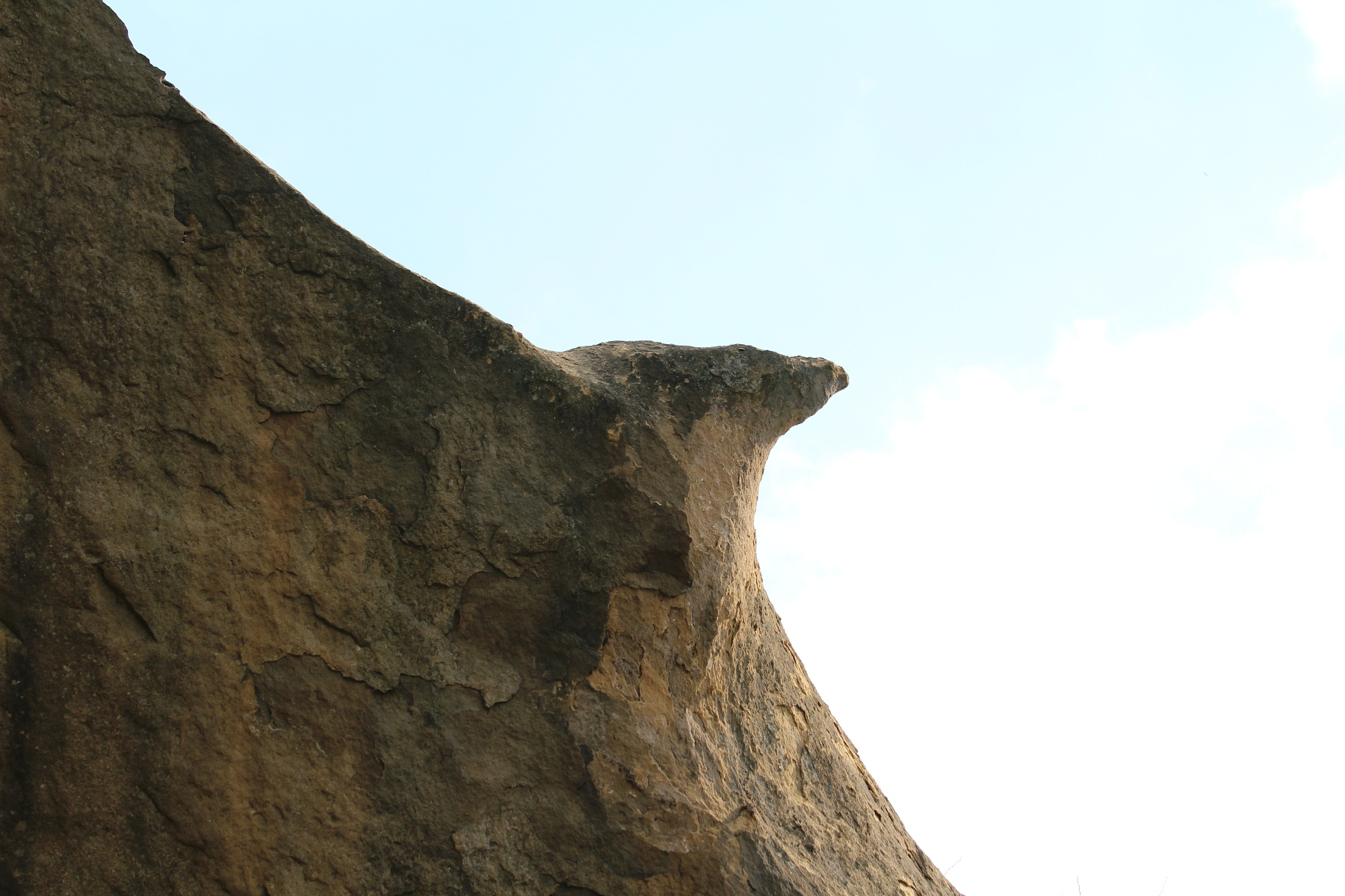 Stânca schitului "Sf. Apostoli" - Jgheaburi, dă numele de Corbii de Piatră al locului 03